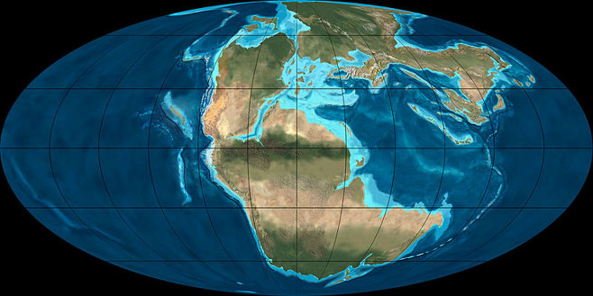 Carte de la paléogéographie au Jurassique précoce (195 Ma)